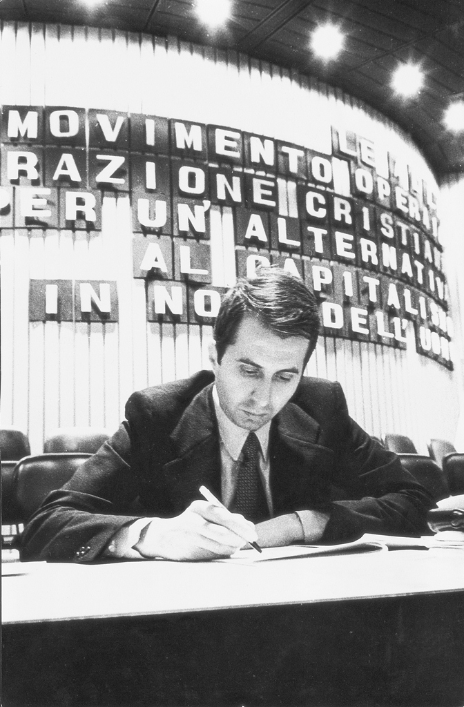 Emilio Gabaglio, 1970, Convegno Acli